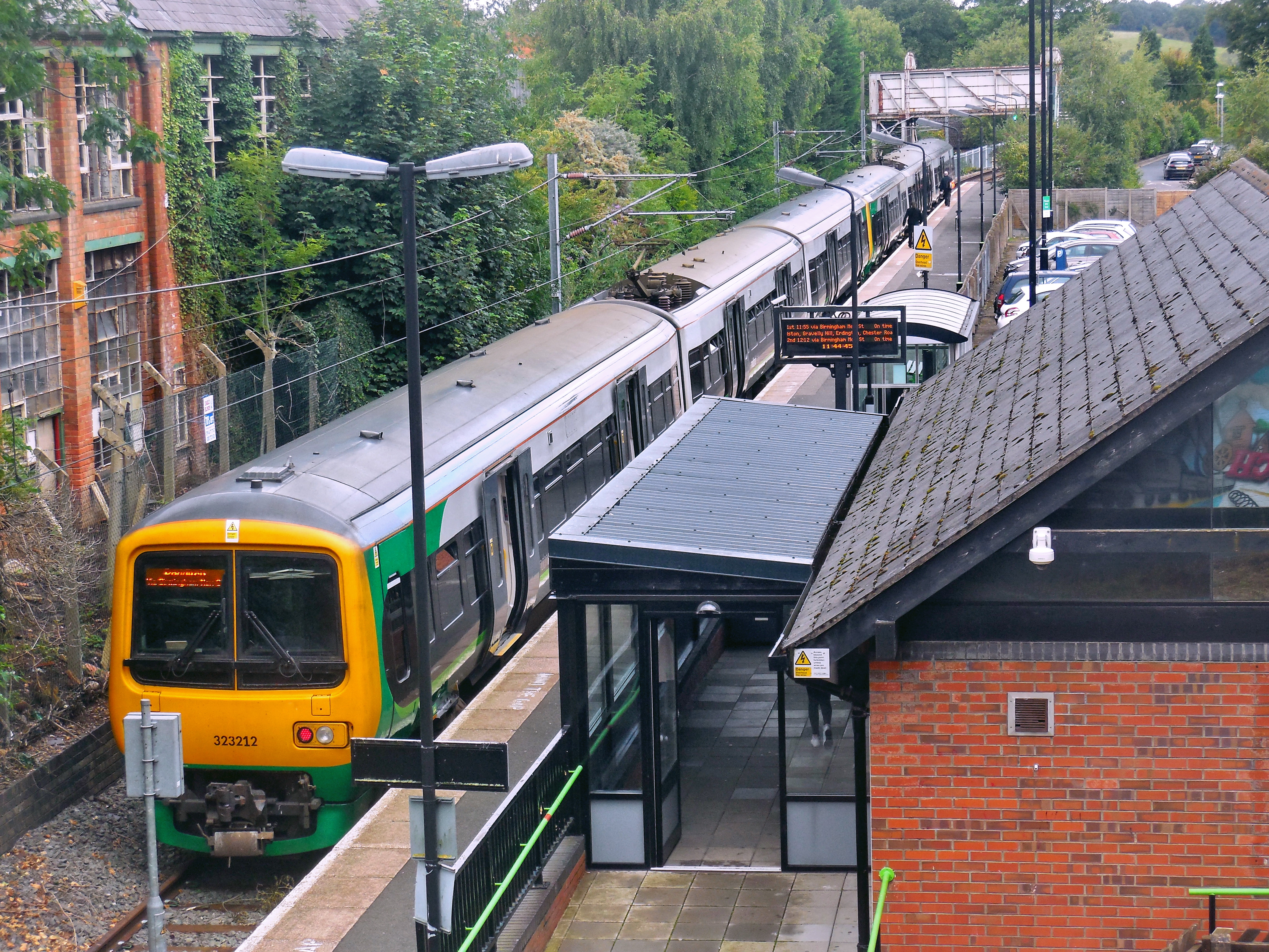 Redditch